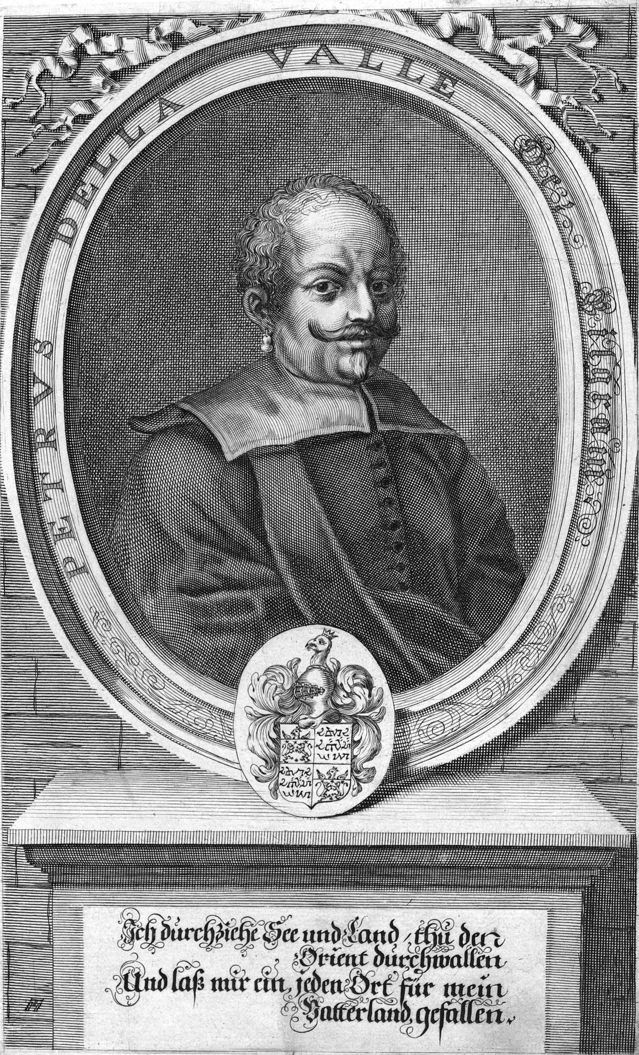 Depicted person: Pietro Della Valle